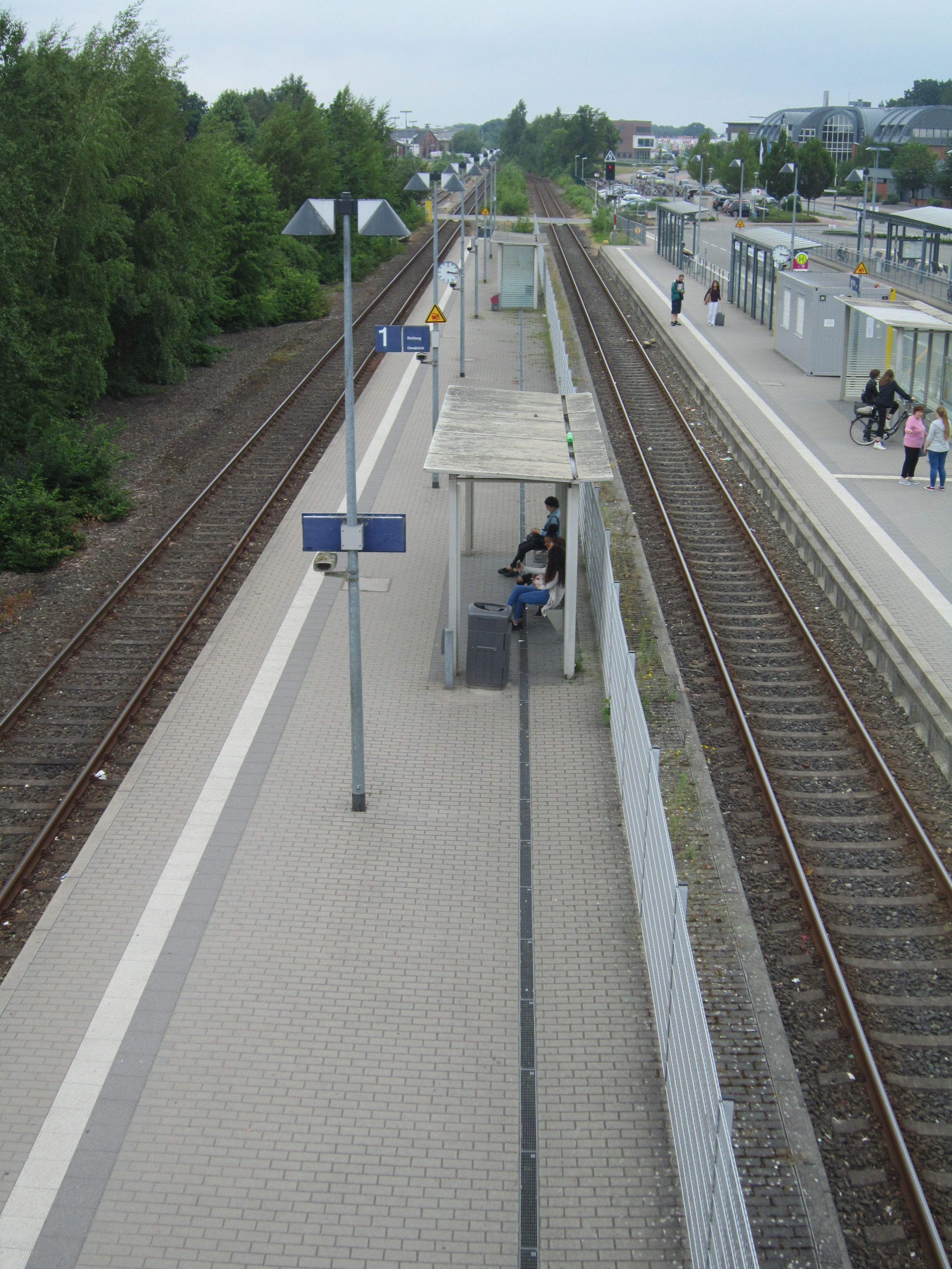 Blick auf die Bahnsteige des Bahnhofs Vechta von der 2018 eingeweihten Brücke für Fußgänger und Radfahrer über die Bahnlinie Delmenhorst - Bramsche der NordWestBahn